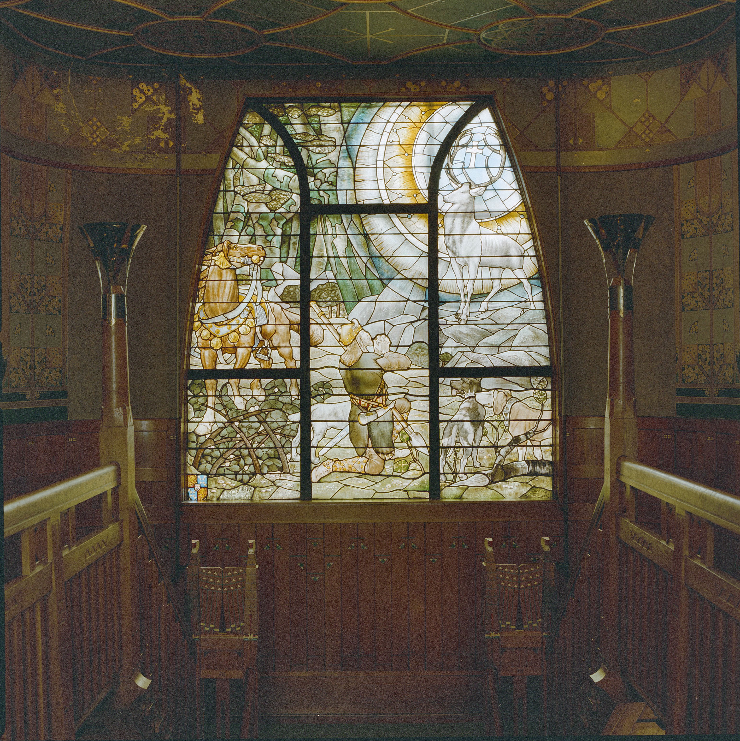 Jachtslot Mookerheide: Interieur, eerste verdieping, hal, glas in loodraam (Sint Hubertus)